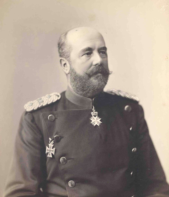 Eduard von Treskow, Oberst und Kommandeur des Regiments von 1888-1891, Brustbild 1888; Landesarchiv Baden-Württemberg